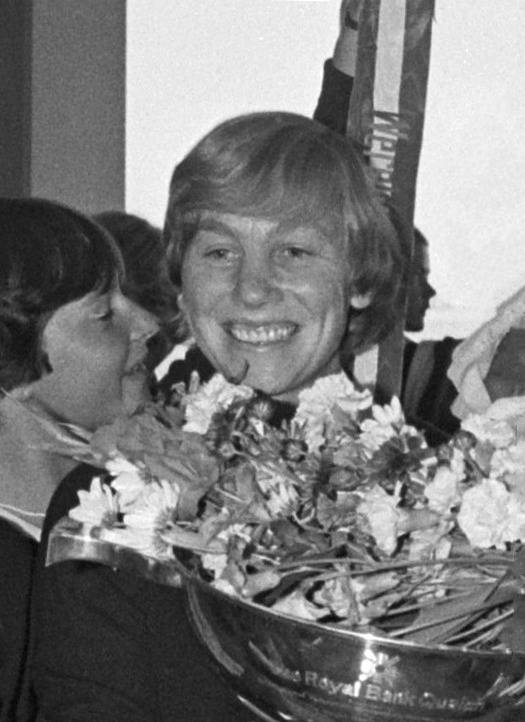 Aankomst uit Canada van wereldkampioen dameshockey Nederland op Schiphol. Aanvoerster Maria Mattheussens met de beker